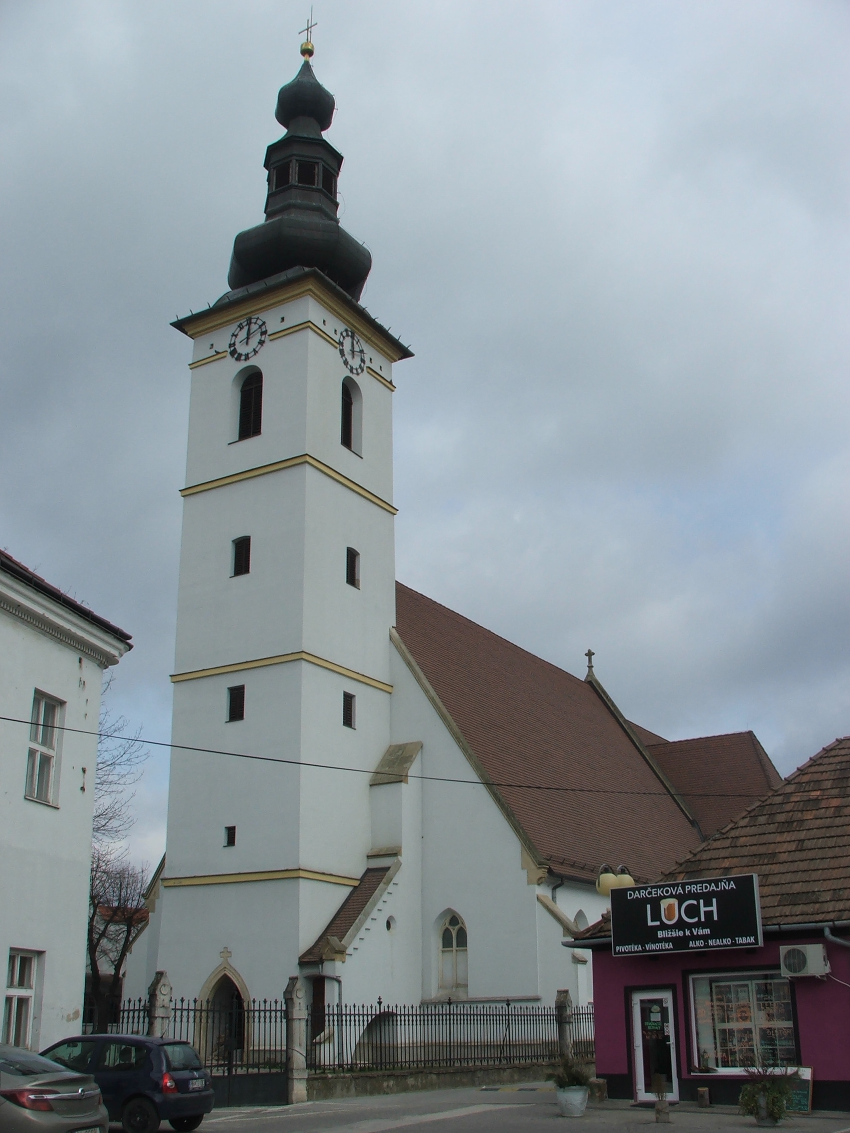 Pezinok - Kostol Nanebovzatej Panny Márie - pohľad juhozápadný